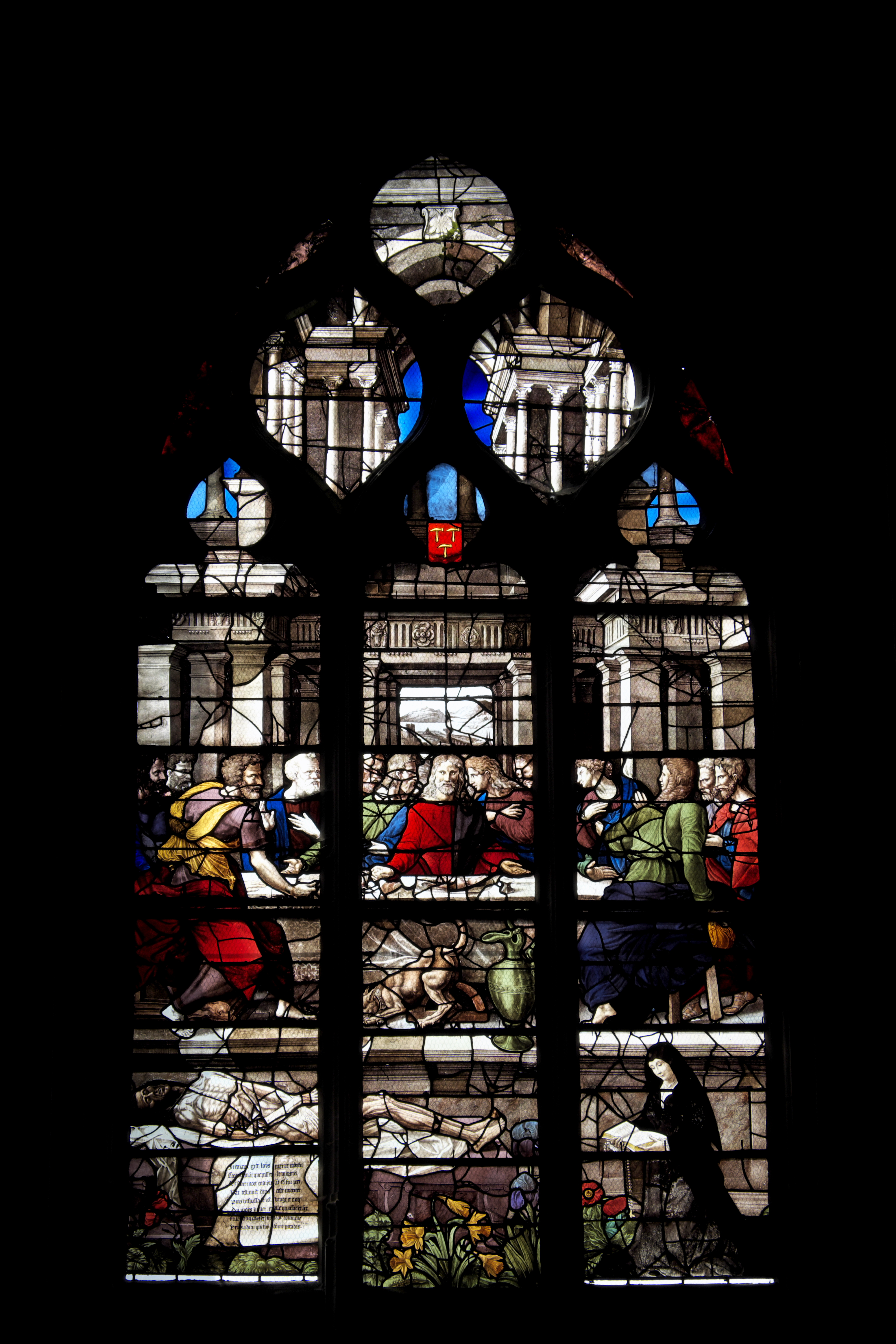 Katholische Kirche Sainte-Foy in Conches-en-Ouche im Département Eure (Haute-Normandie/Frankreich), Bleiglasfenster aus der 1. Hälfte des 16. Jahrhunderts; Darstellung: Letztes Abendmahl